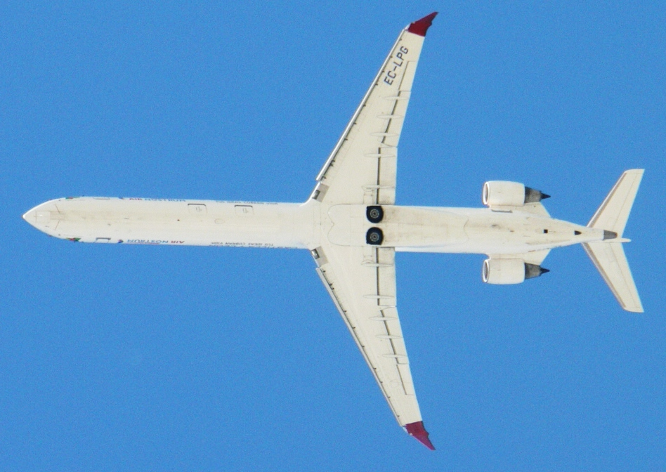 Vista casi "planform" de un CRJ-1000 de Air Nostrum (EC-LPG) tras haber despegado del Aeropuerto Adolfo Suárez Madrid-Barajas.